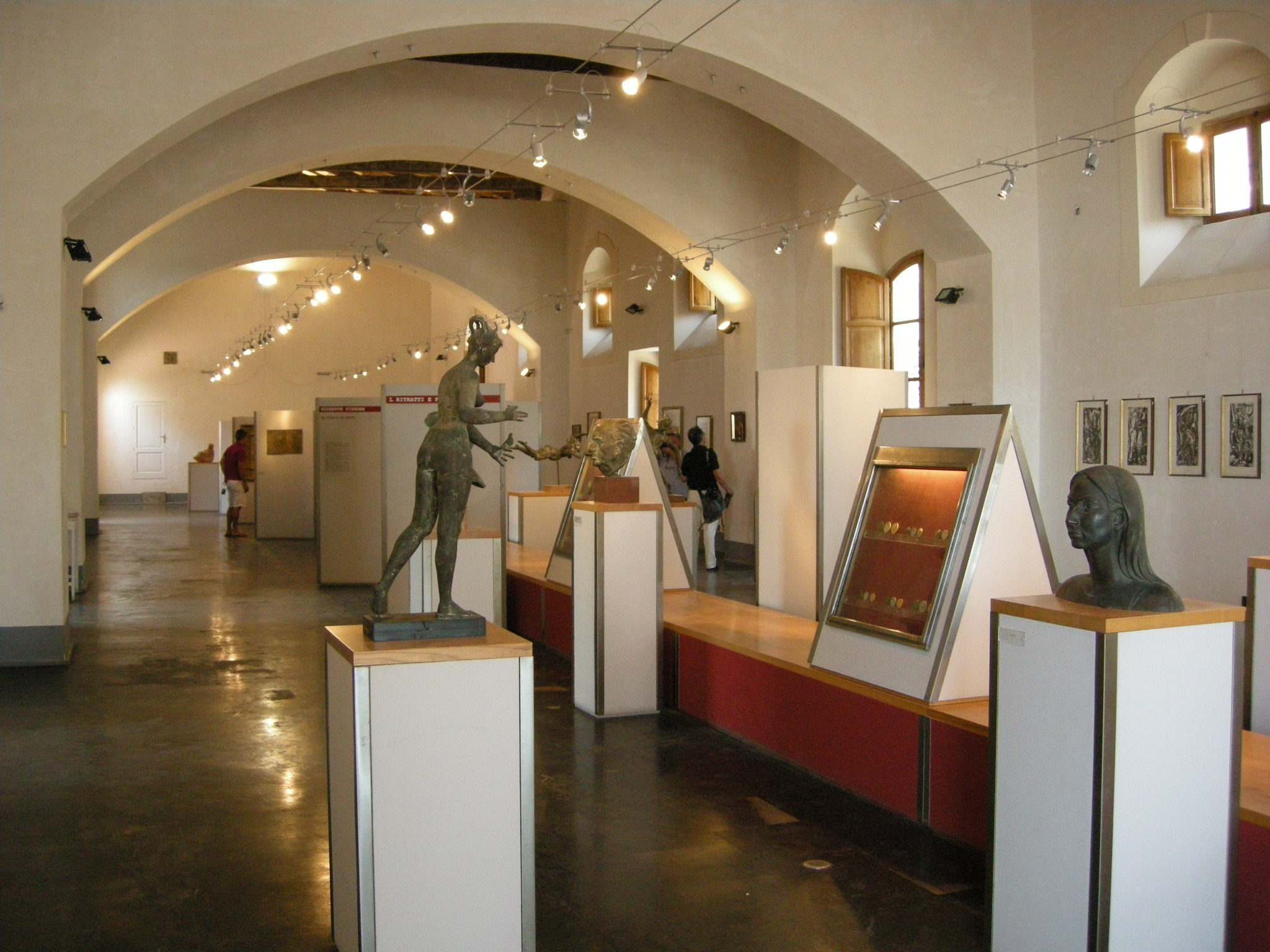 Noto, museo civico e. pirrone